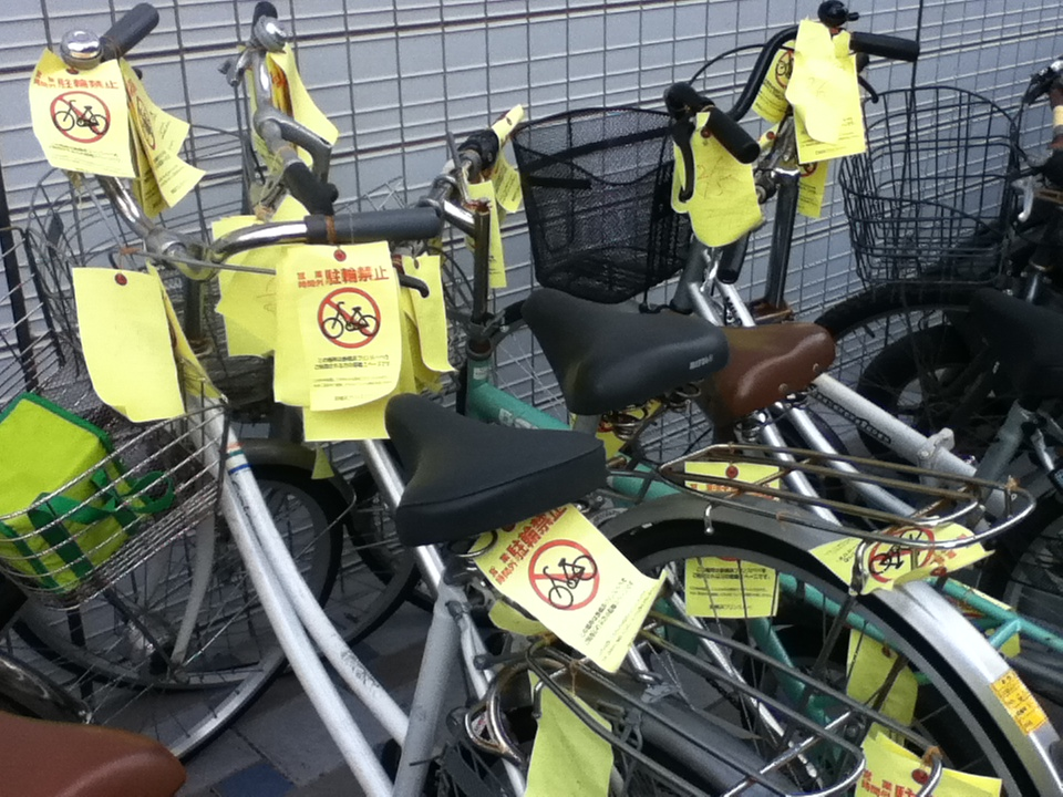 新横浜プリンスペペ other